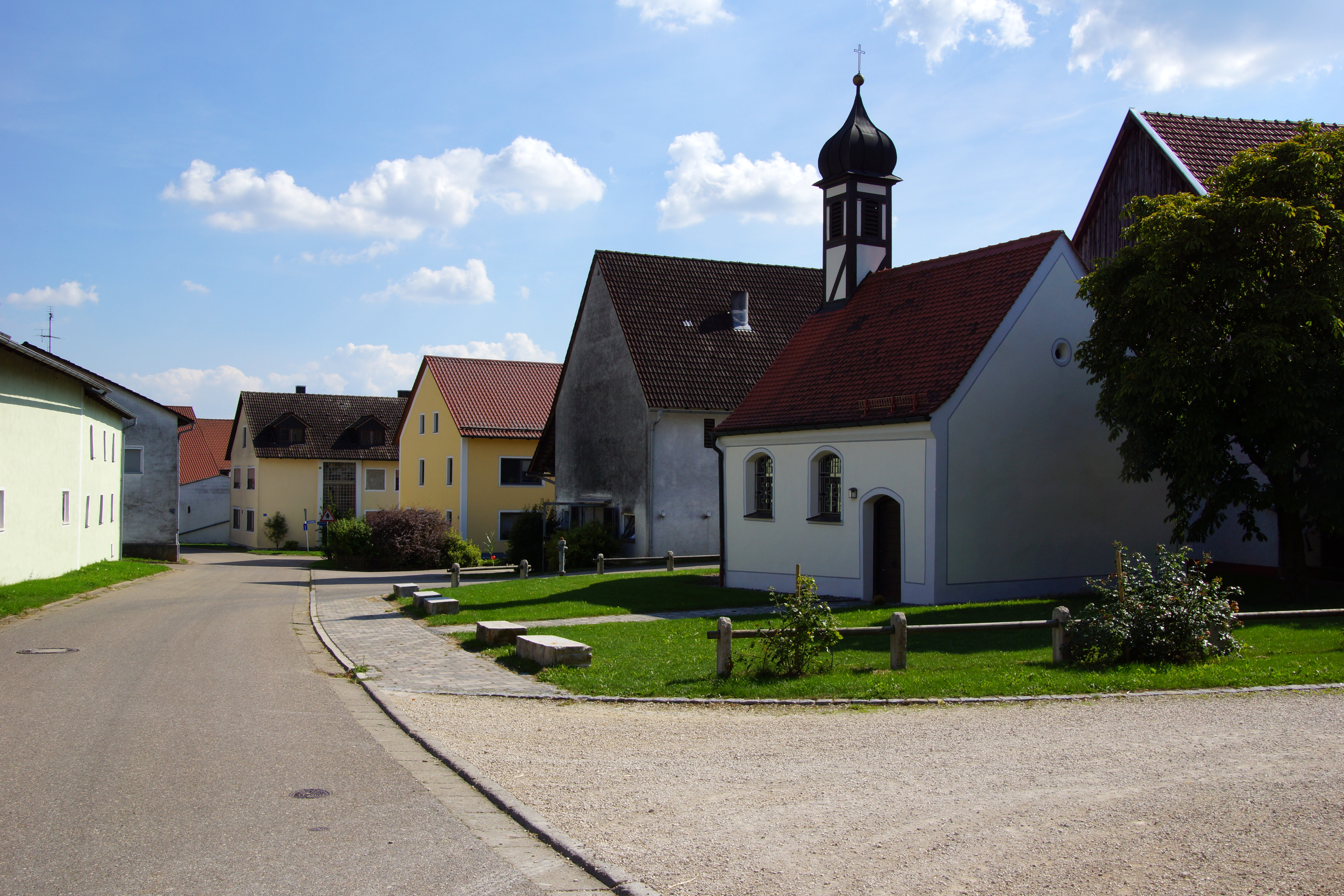 Die Ortskapelle Kostbares Blut Christi in Haunsfeld bei Mörnsheim